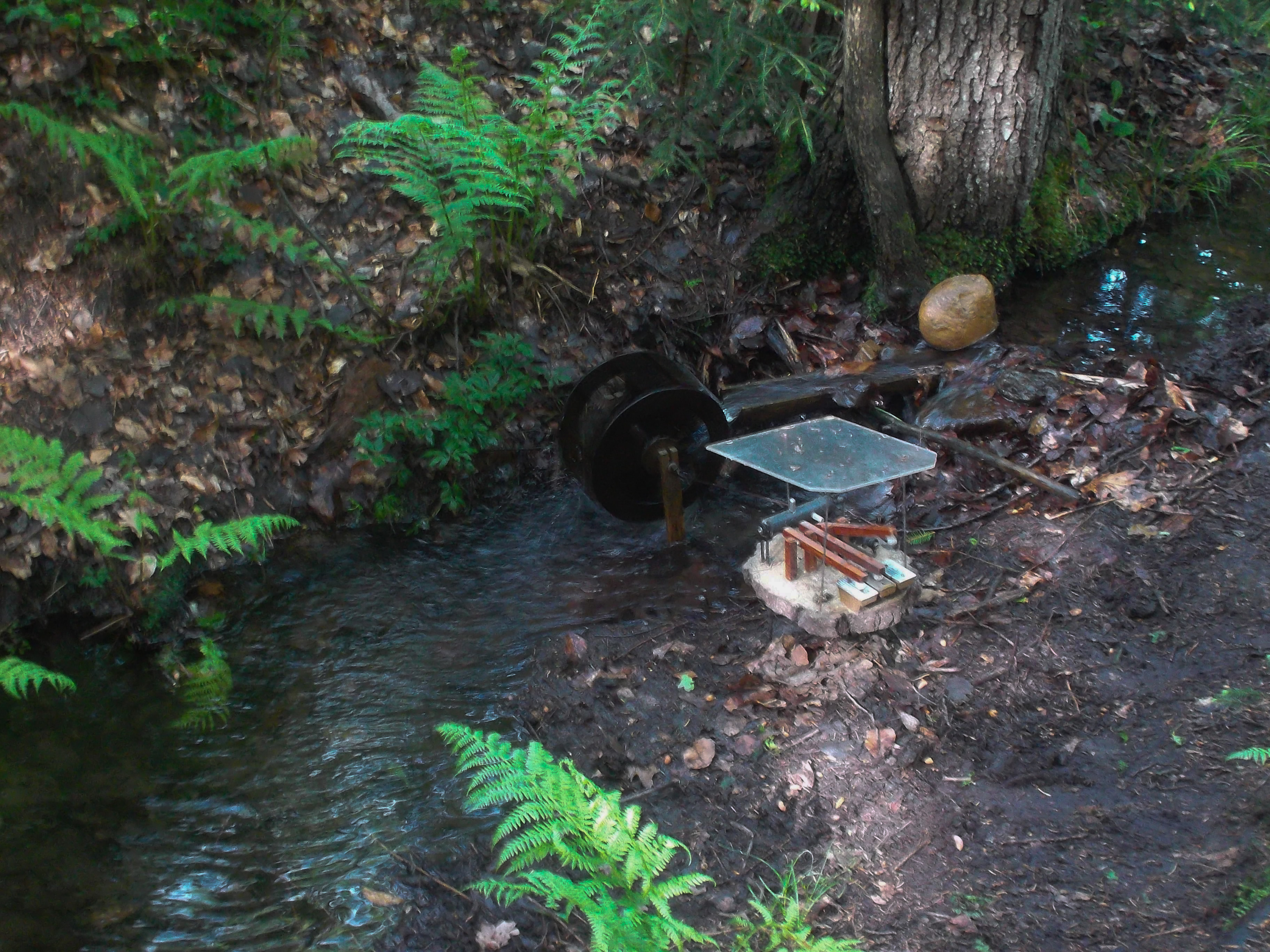 ein kleiner Bachlauf im Buchenmischwald südlich von Tautewalde